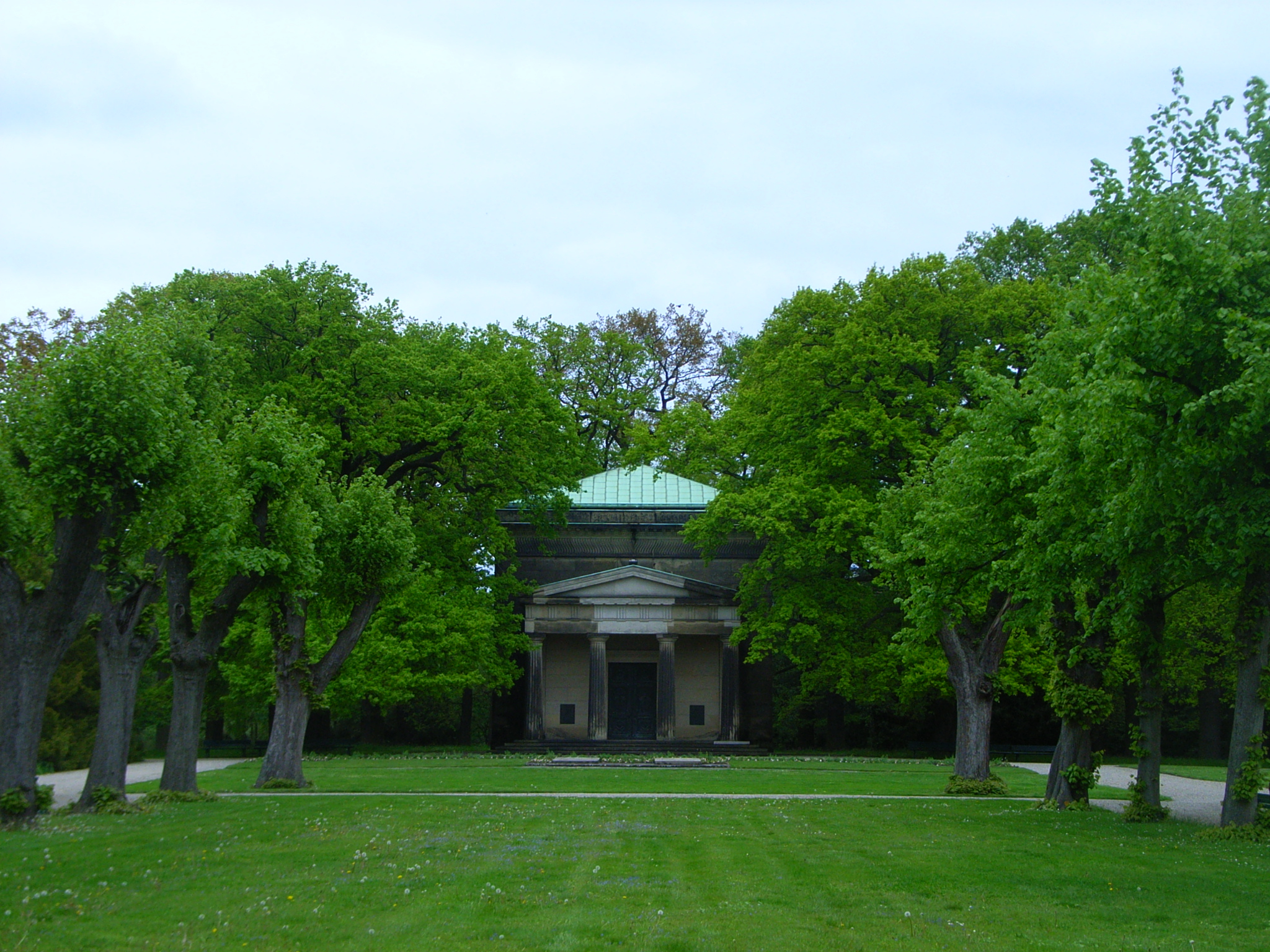 Das Welfenmausoleum mit dem Eichenhain und der Allee im Berggarten